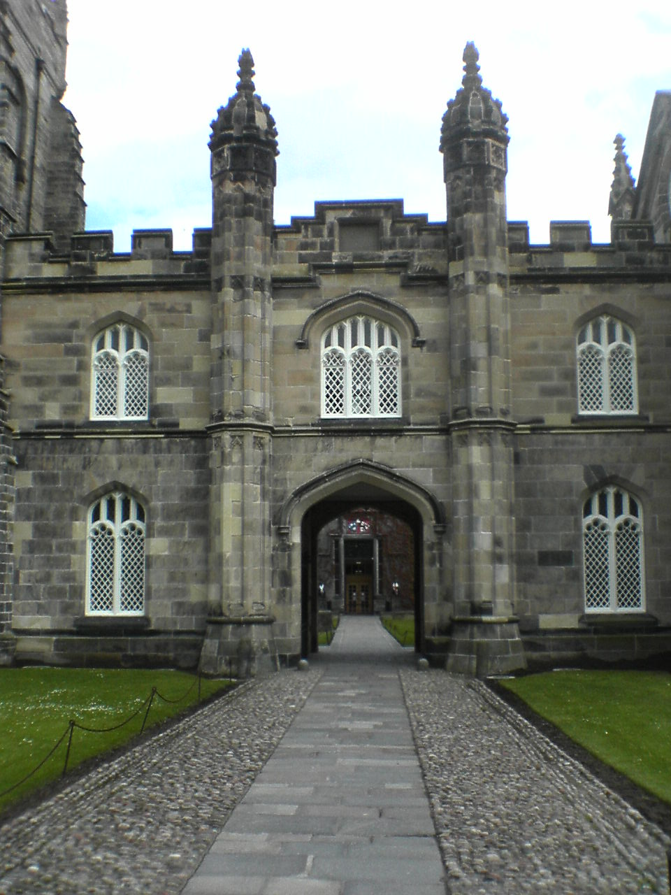 King's College, Aberdeen entrance arch, University of Aberdeen, UK. Category:Aberdeen